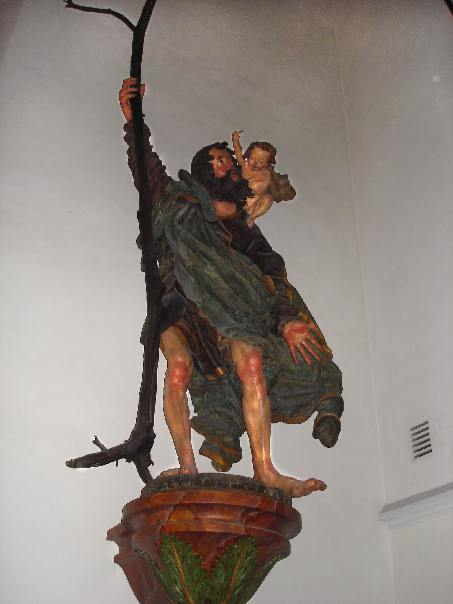 hl. Christopherus von Hans Leinberger in der Katharinakapelle